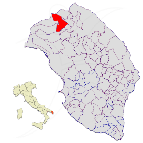 Il territorio del comune di Campi Salentina nella provincia